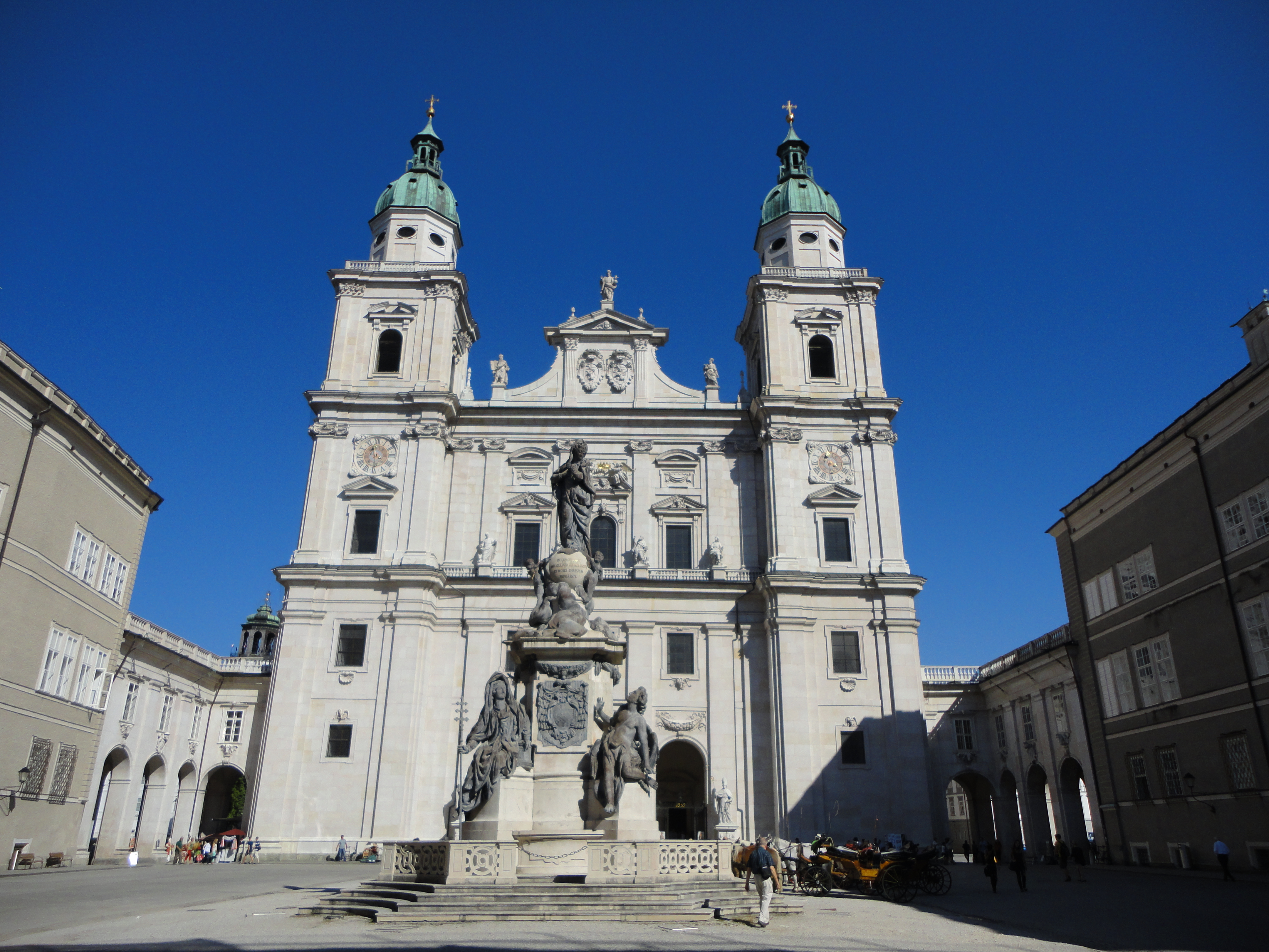 Dom, hll. Rupert und Virgil